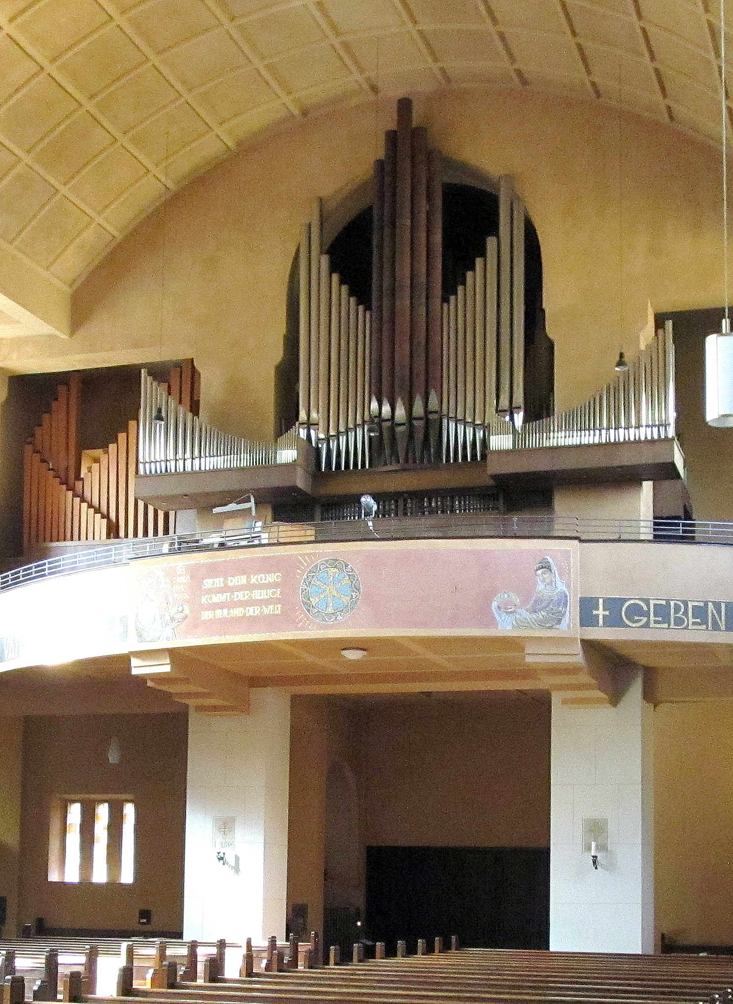 Blick ins Innere der Christkönig-Kirche in Saarbrücken-St. Arnual, Saarland